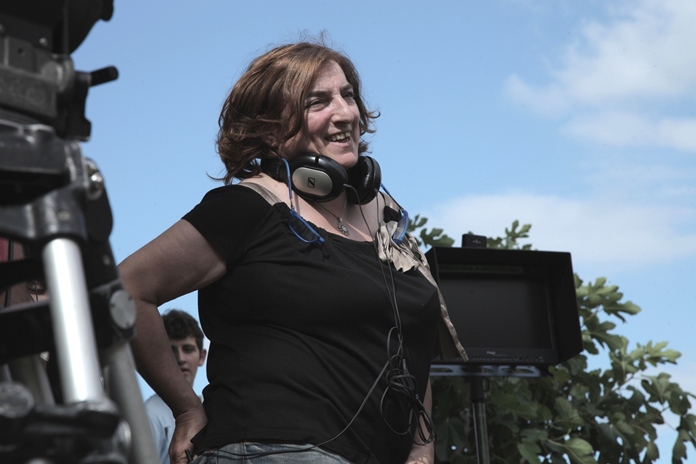 Ana Murugarren durante el rodaje de "La higuera de los bastardos"